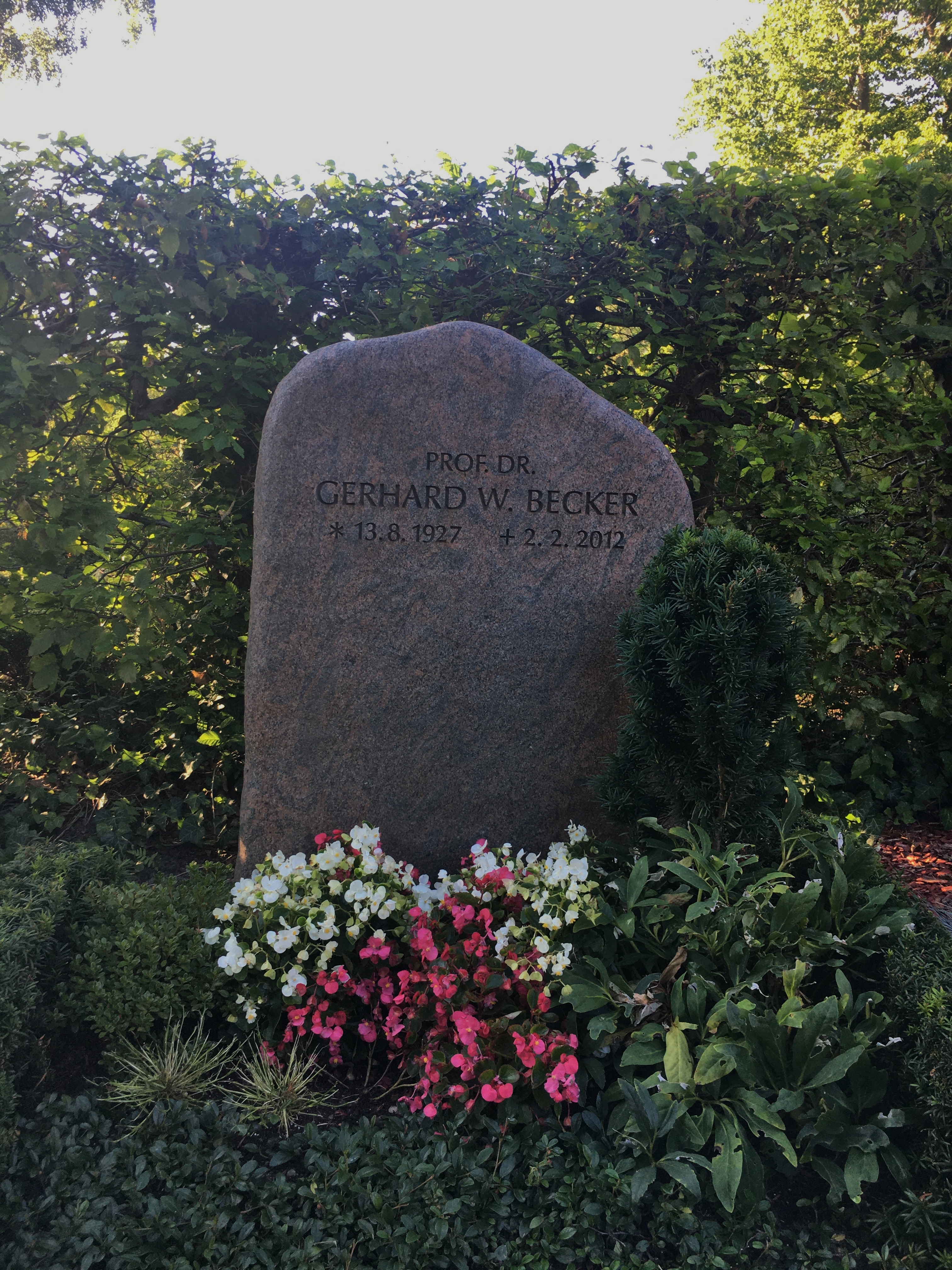 Grabstätte Gerhard W. Becker